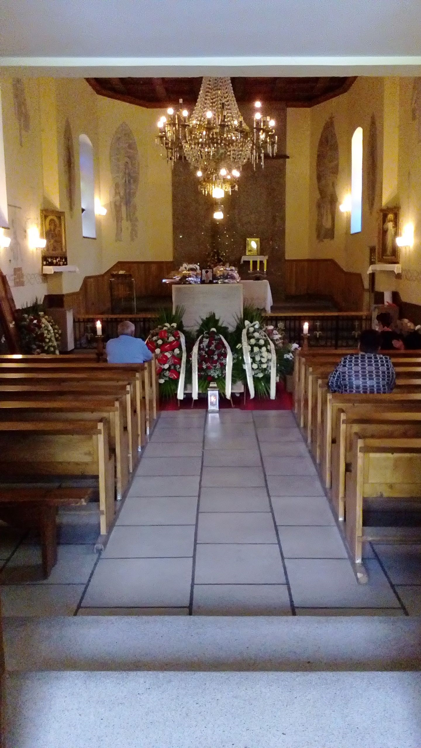 Wnętrze kaplicy pogrzebowej w Czaszynie